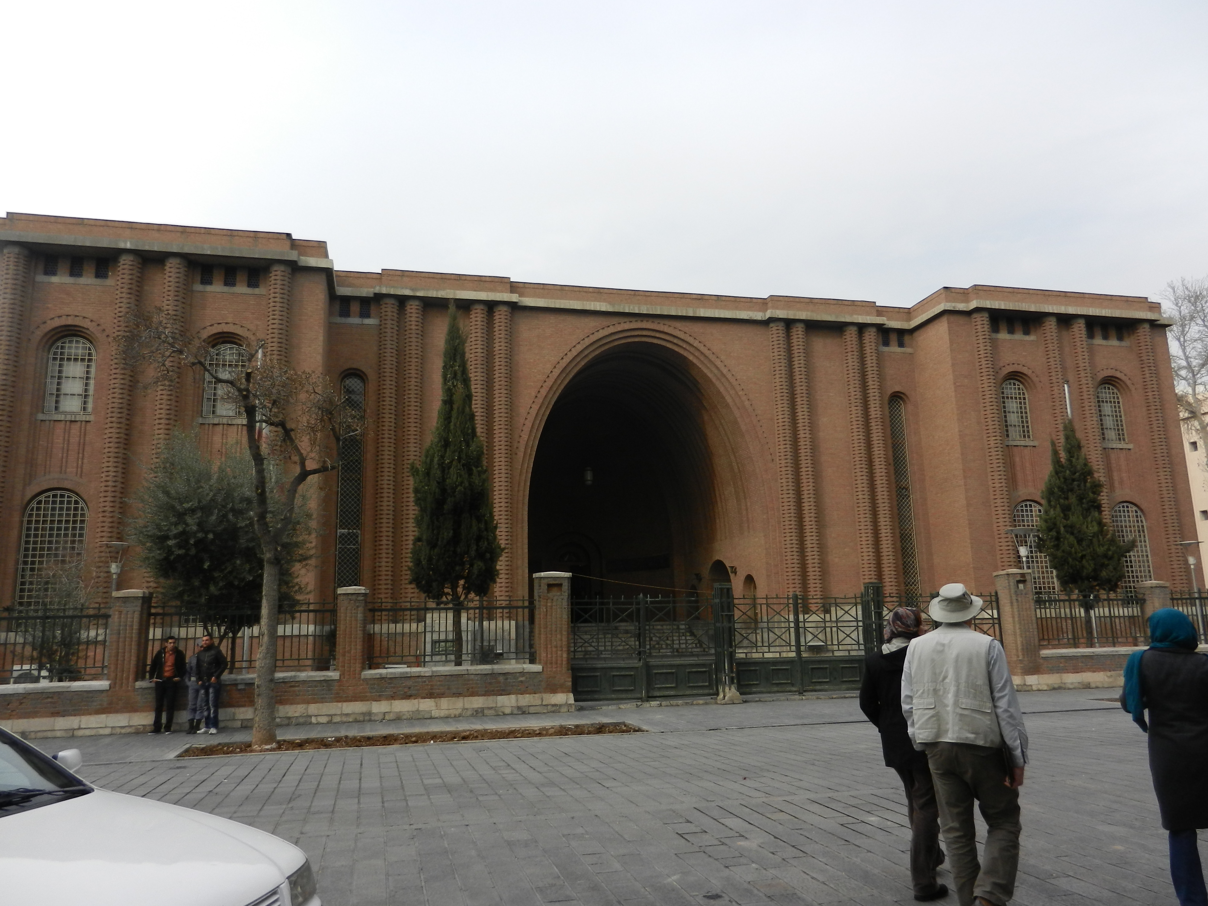 Narodni muzej v Teheranu, Iran.